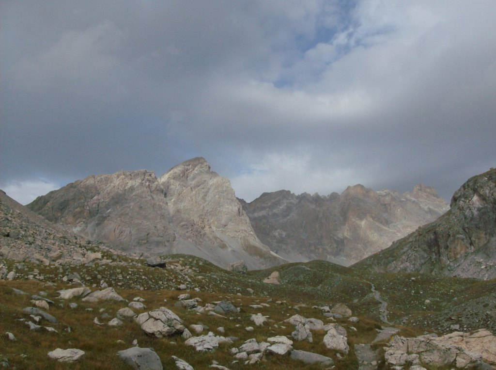 Sentiero Dino Icardi (Valle Maira) - la parte bassa del Vallonasso di Stroppia vista da poco sopra il Colle dell'Asino; in centro, il monte Baueria